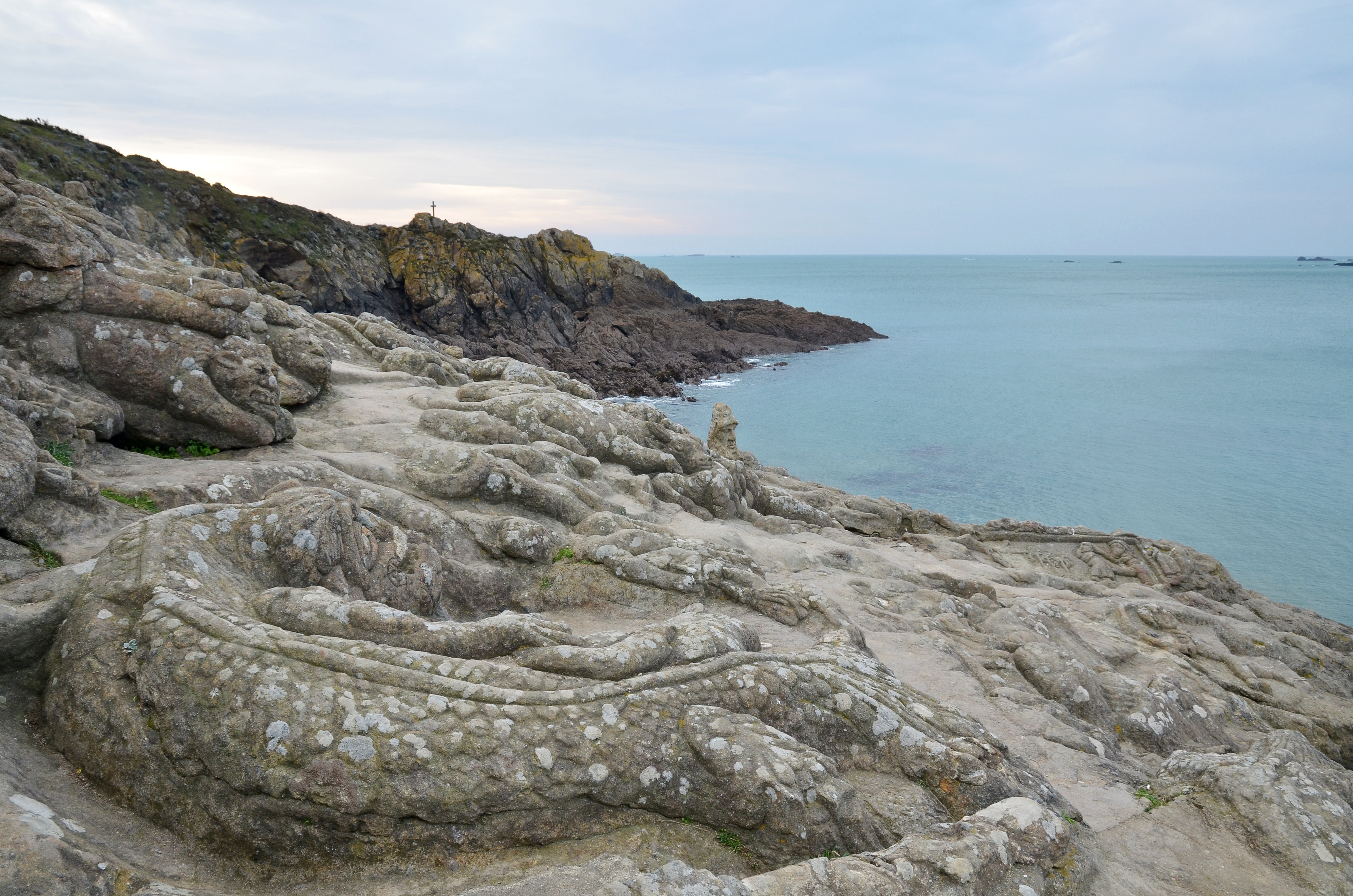 Rochers sculptés de Rothéneuf, Bretagne, France